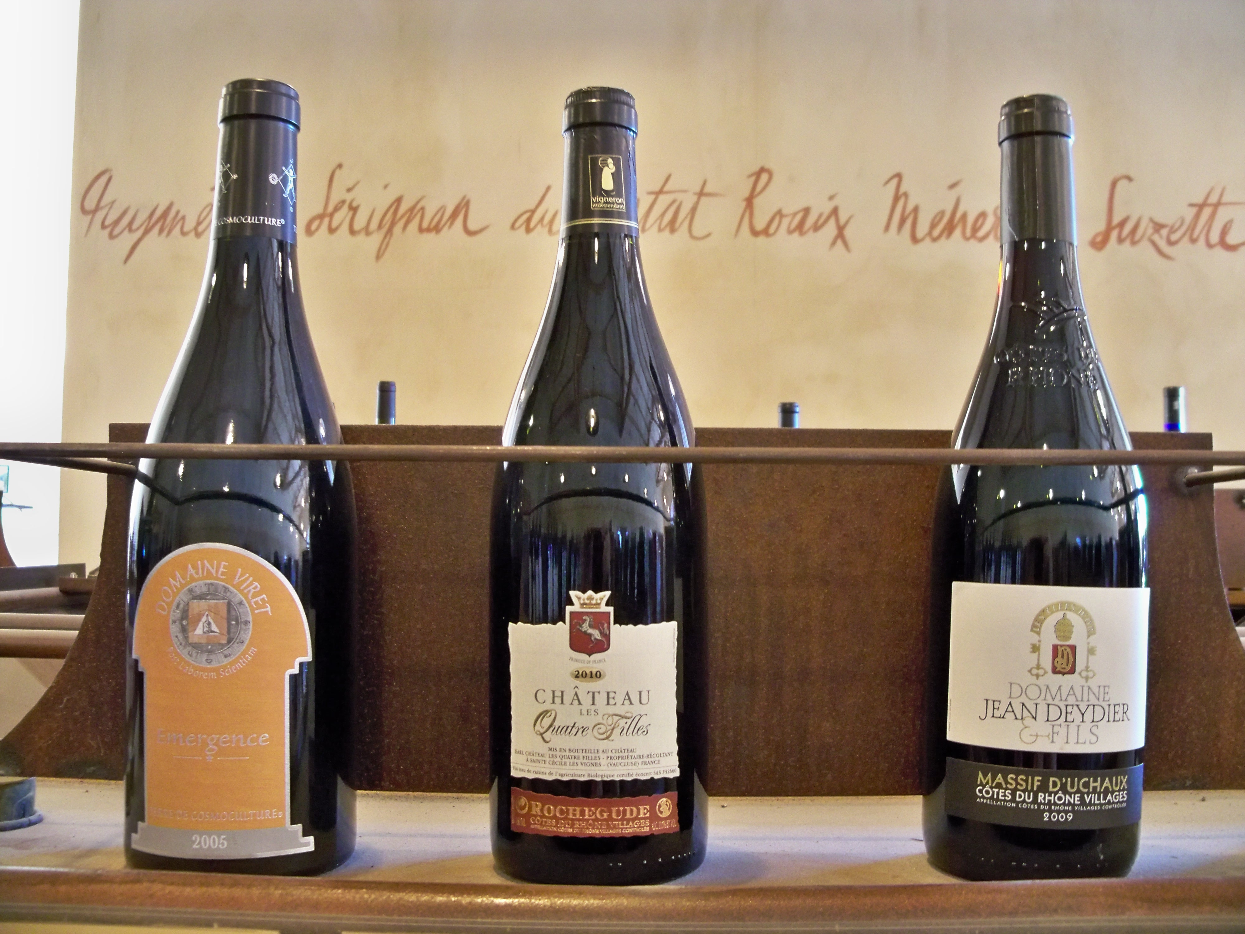 Bouteilles Massif d'Uchaux